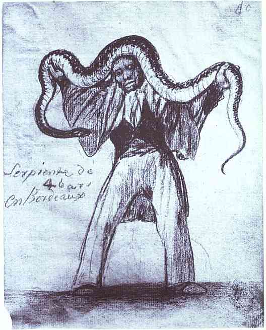 Francisco de Goya: Serpiente de 4 bares en Bordeaux (1824/1828) Zeichnung aus dem Album H; schwarze Kreide Vormals Berliner Privatbesitz, möglicherweise zerstört